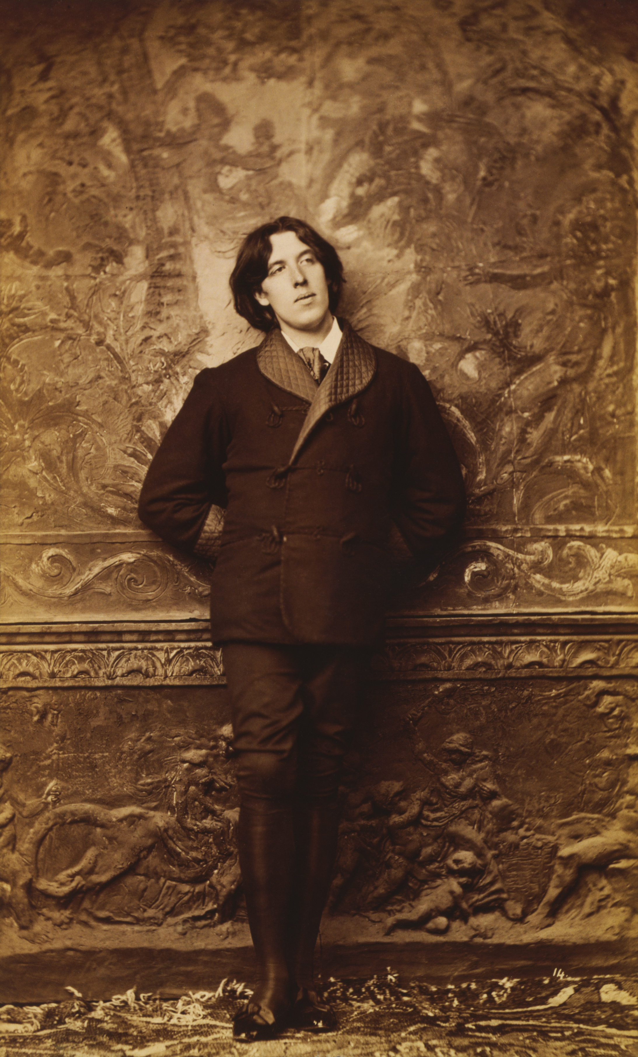 Oscar Wilde